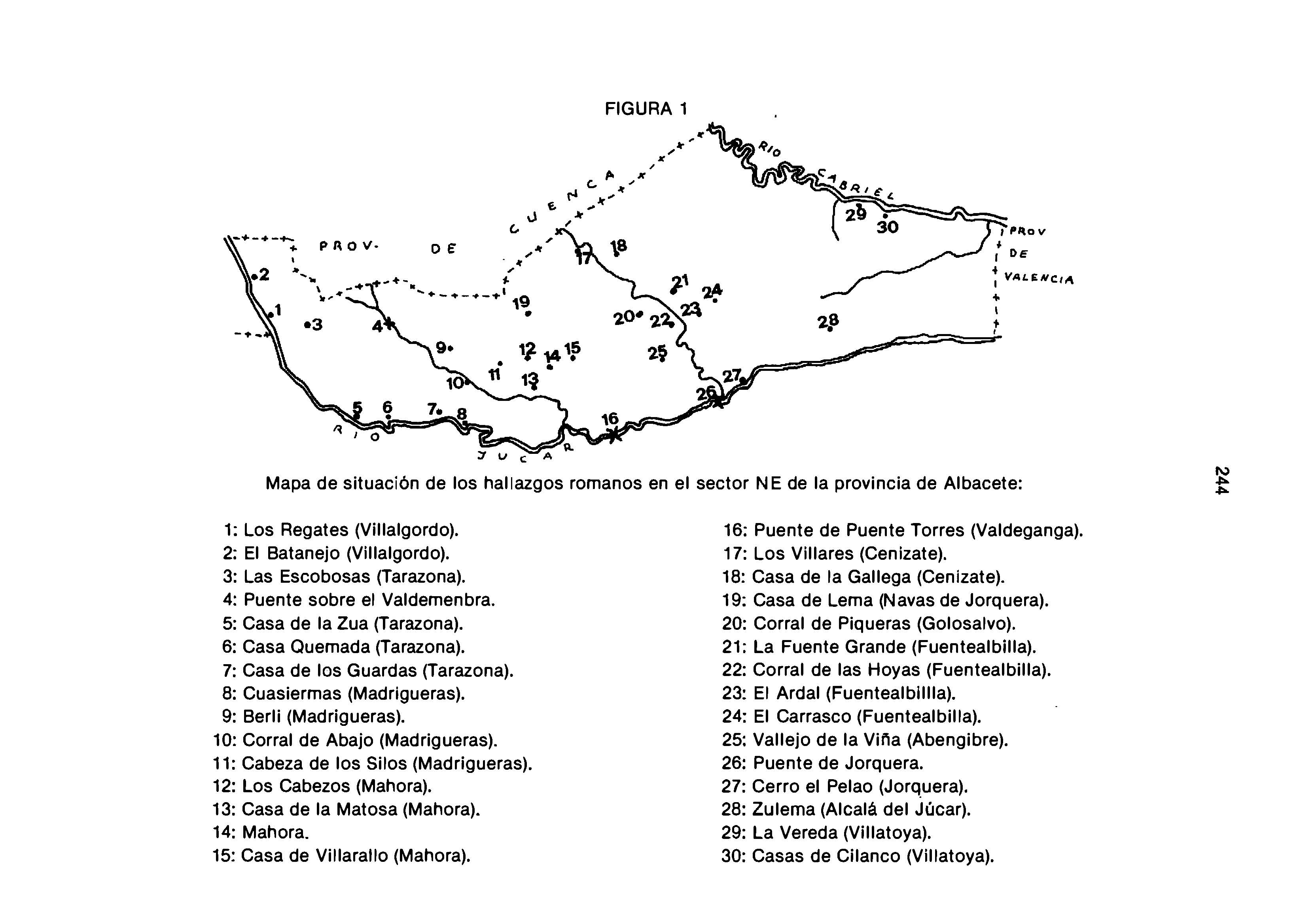 Localización de los yacimientos romanos en la Manchuela